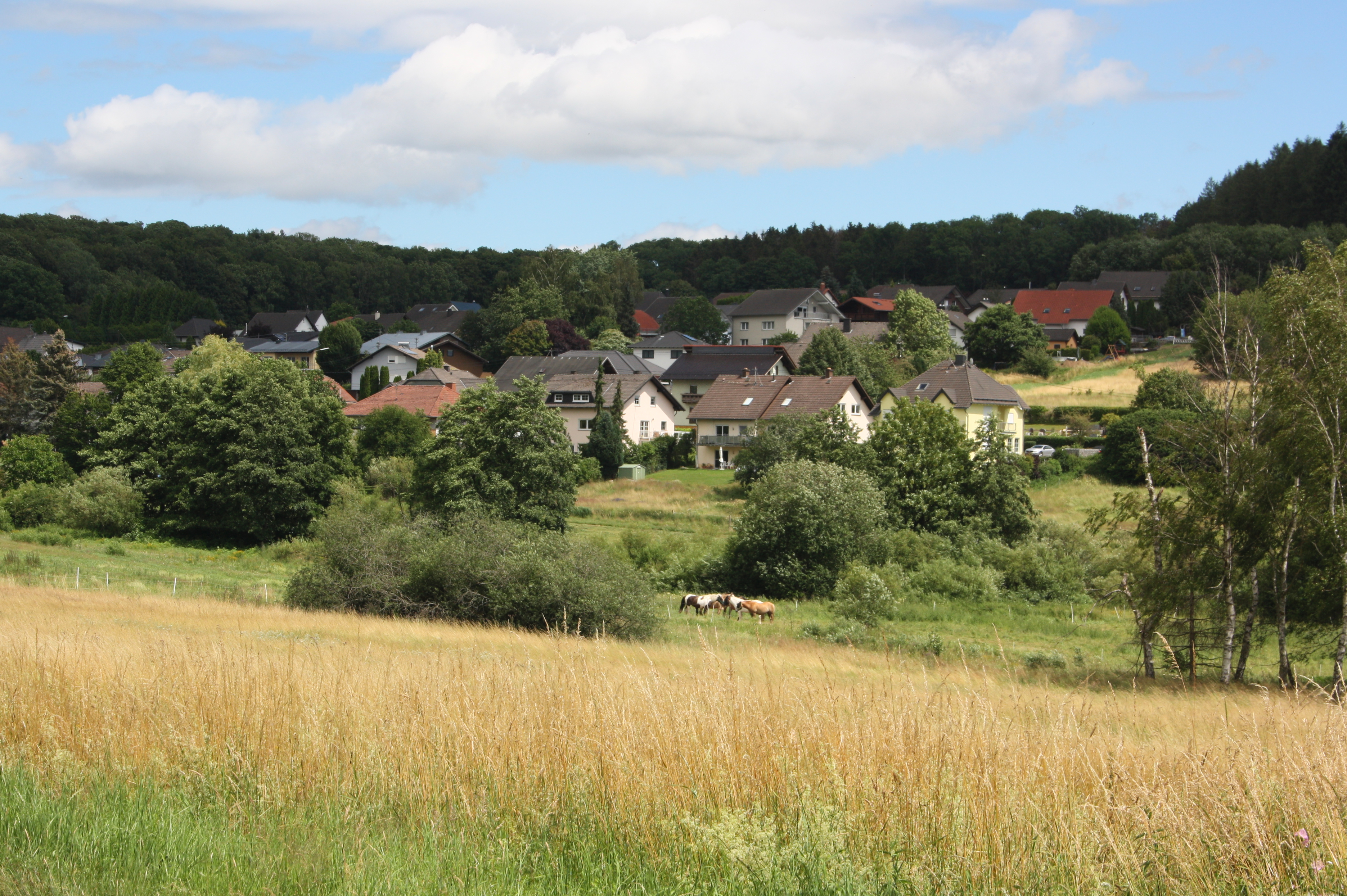 Sainerholz, Ortsteil von Ötzingen, Westerwald, Rheinland-Pfalz, Deutschland